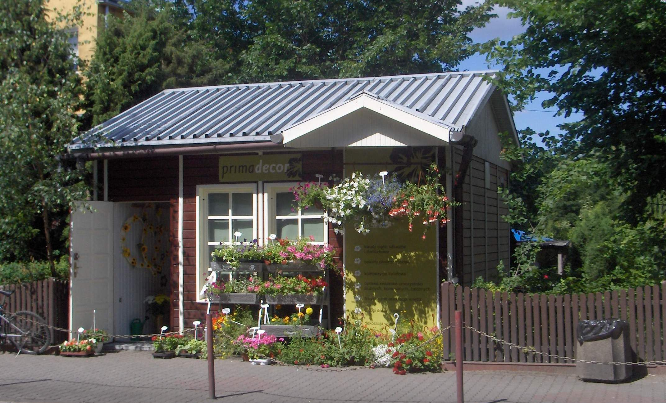 Kwiaciarnia Prima Decor w Słubicach